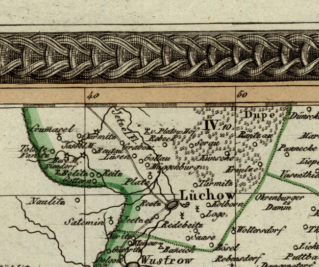 Der Kanton Lüchow (1810-13) im Distrikt Salzwedel, Departement der Elbe, Königreich Westphalen